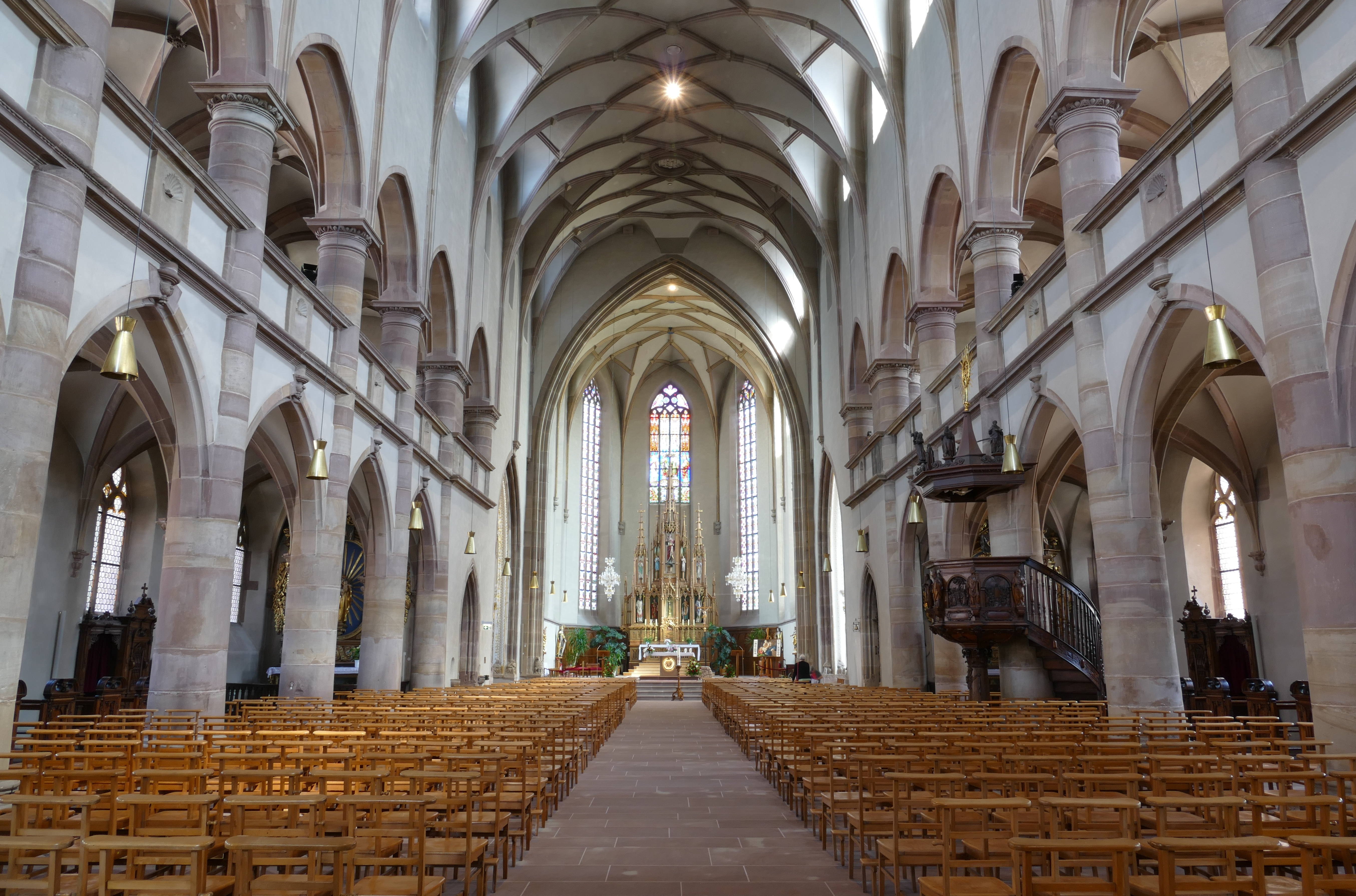 Alsace, Bas-Rhin, Église Saint-Georges de Molsheim, ancienne église des Jésuites (1618) (PA00084798, IA67006097).Vue intérieure de la nef vers le chœur.